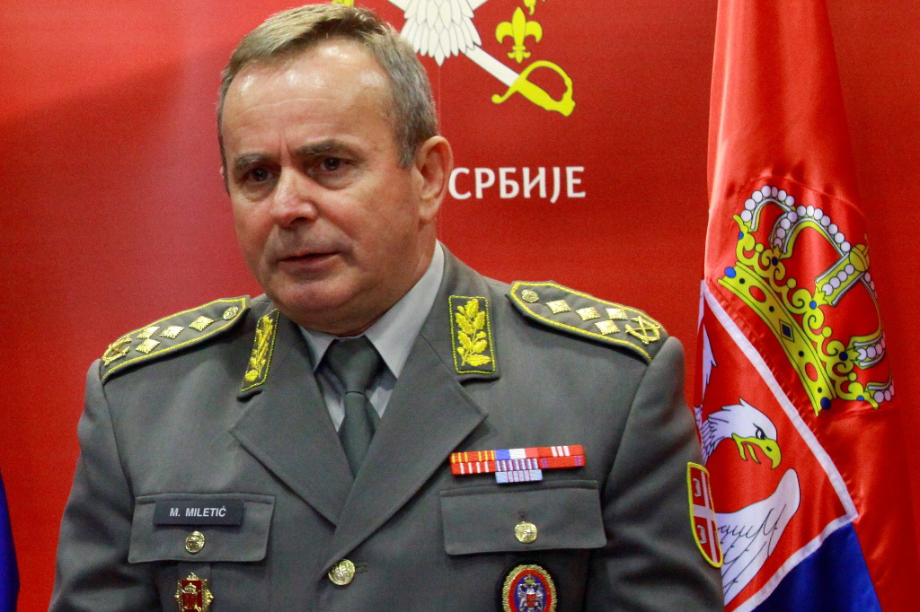 Генерал Милоје Милетић, 2011. година. Слика је преузета са сајта Војске Србије.